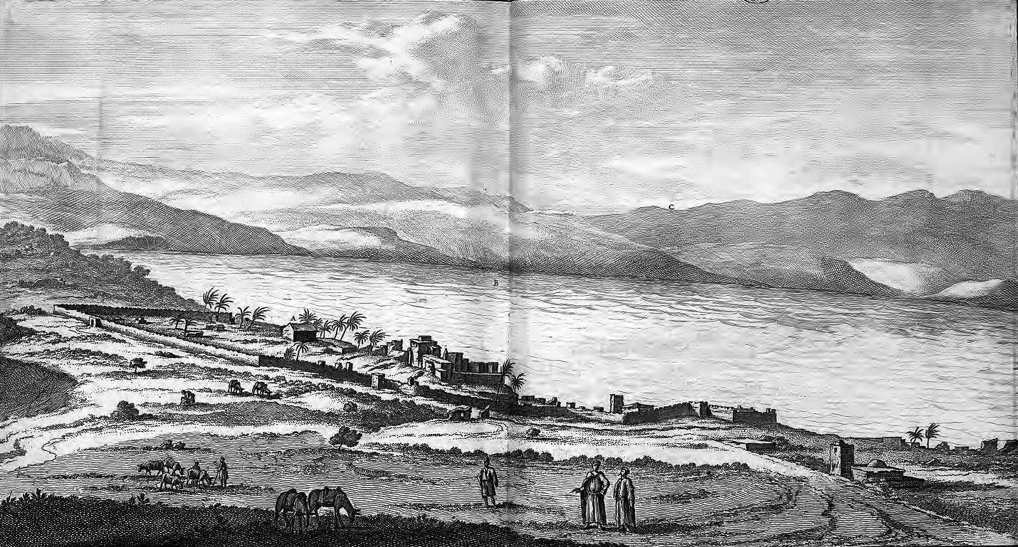 [Voyage au Levant. Pl. 2 double dépl. en reg. p.318 : Voyage de Nazareth à la mer de Galilée. Mer de Galilée et ville de Tibérias.] Tiberias. [Cote : Réserve A 200 293]